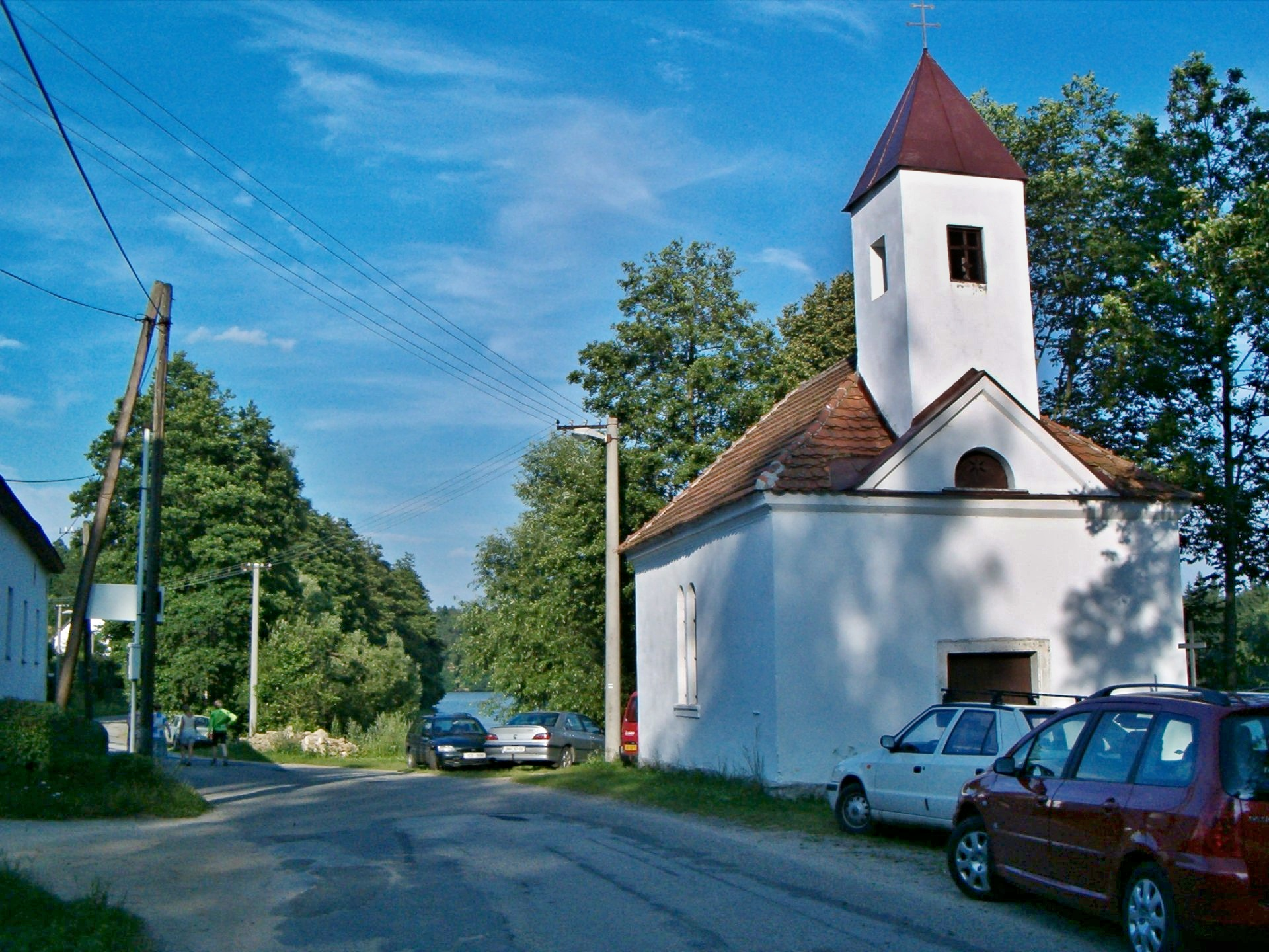 Kaplička v Malém Ratmírově